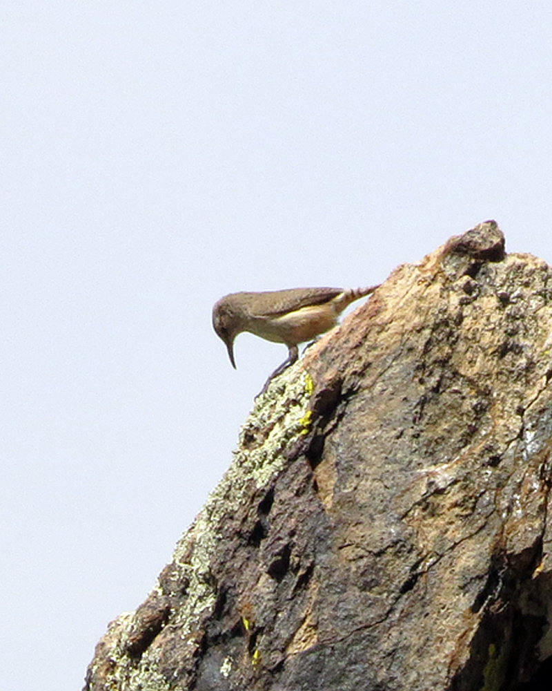 Salpinctes obsoletus obsoletus 21 apr 14 Big Bend NP, Texas